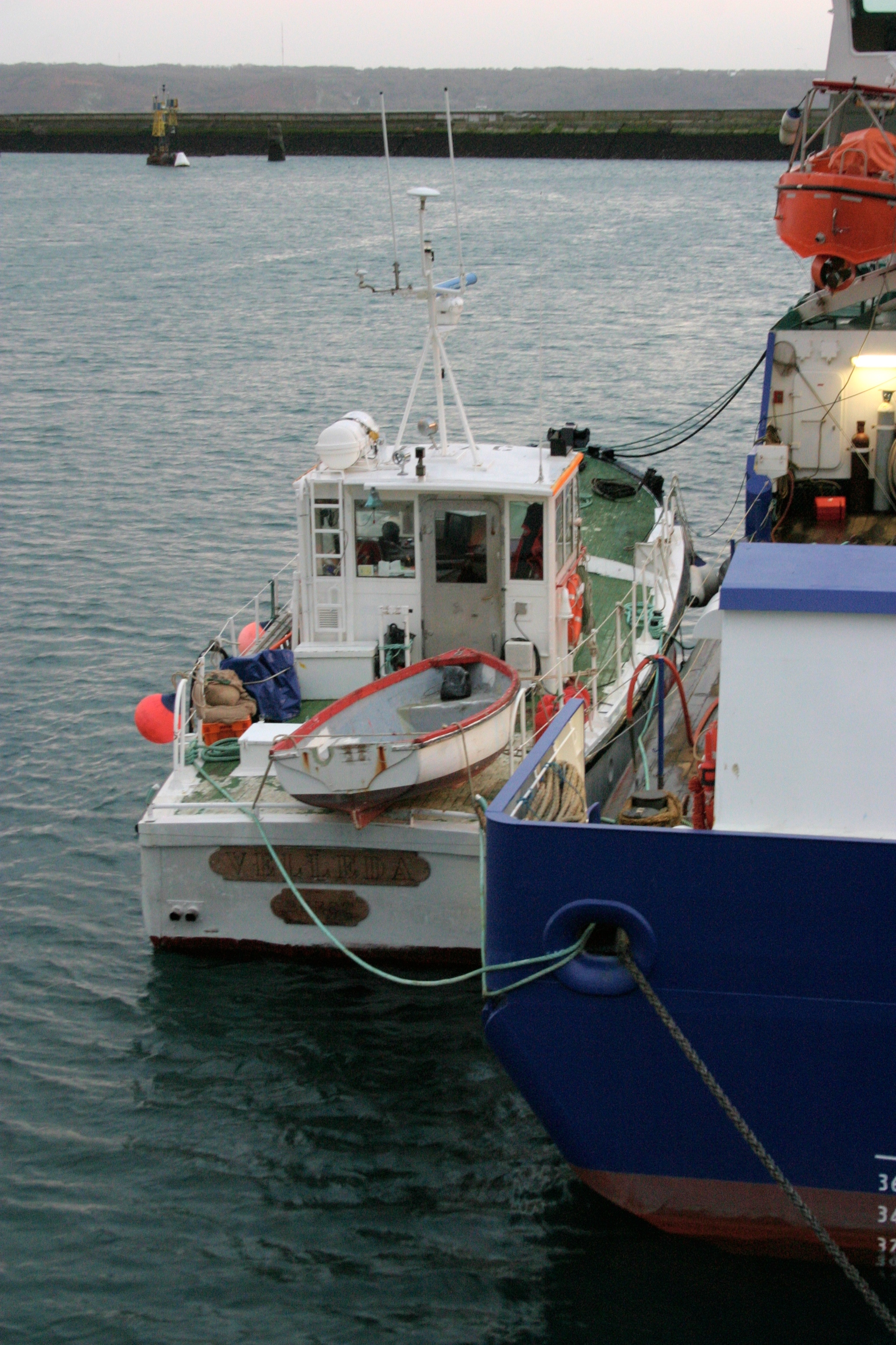 La Velléda, vedette de relève des Phares et balises, à couple du baliseur océanique Armorique, au quai Malbert, à Brest, France